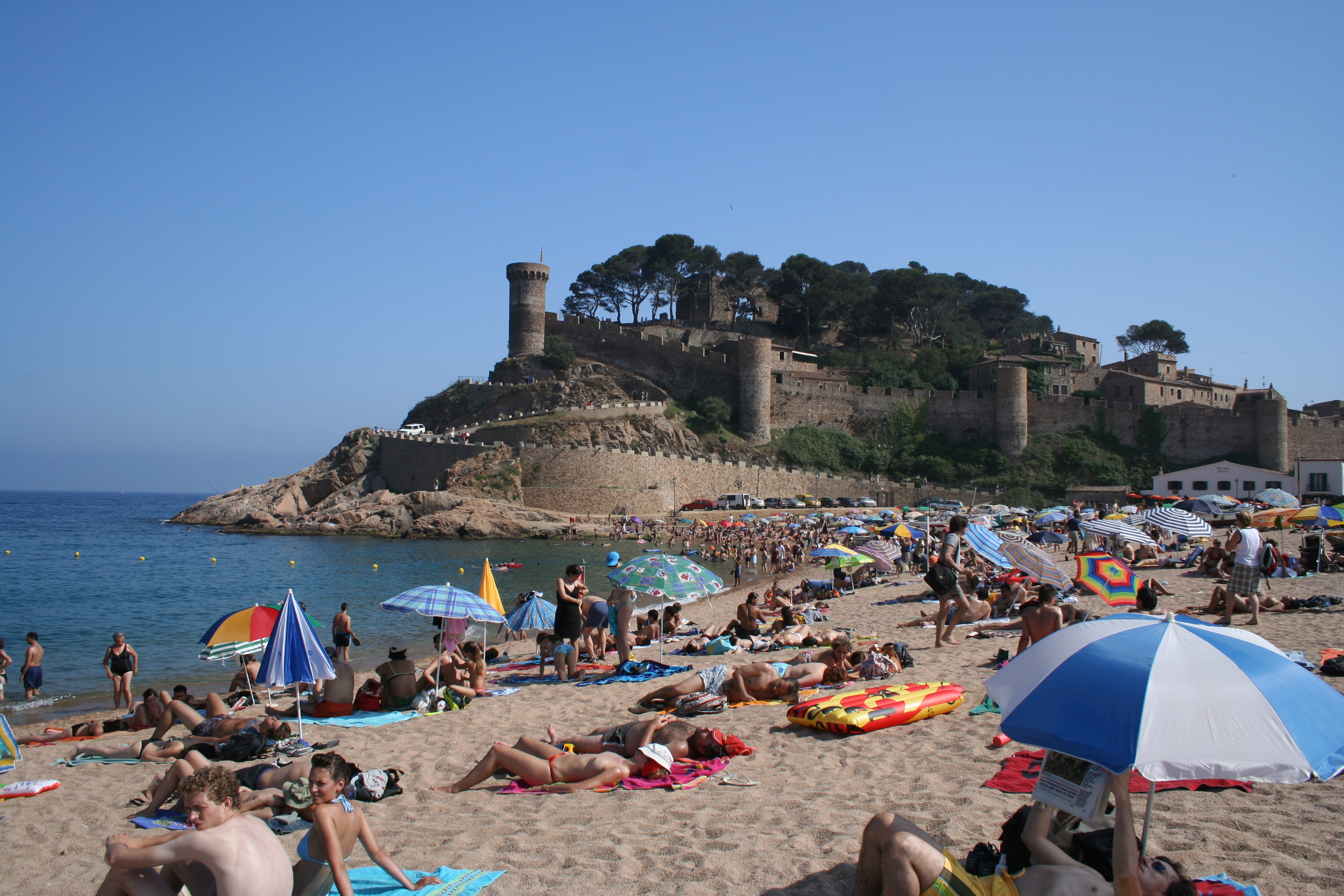 Vista del castillo de Tossa de Mar desde la playa